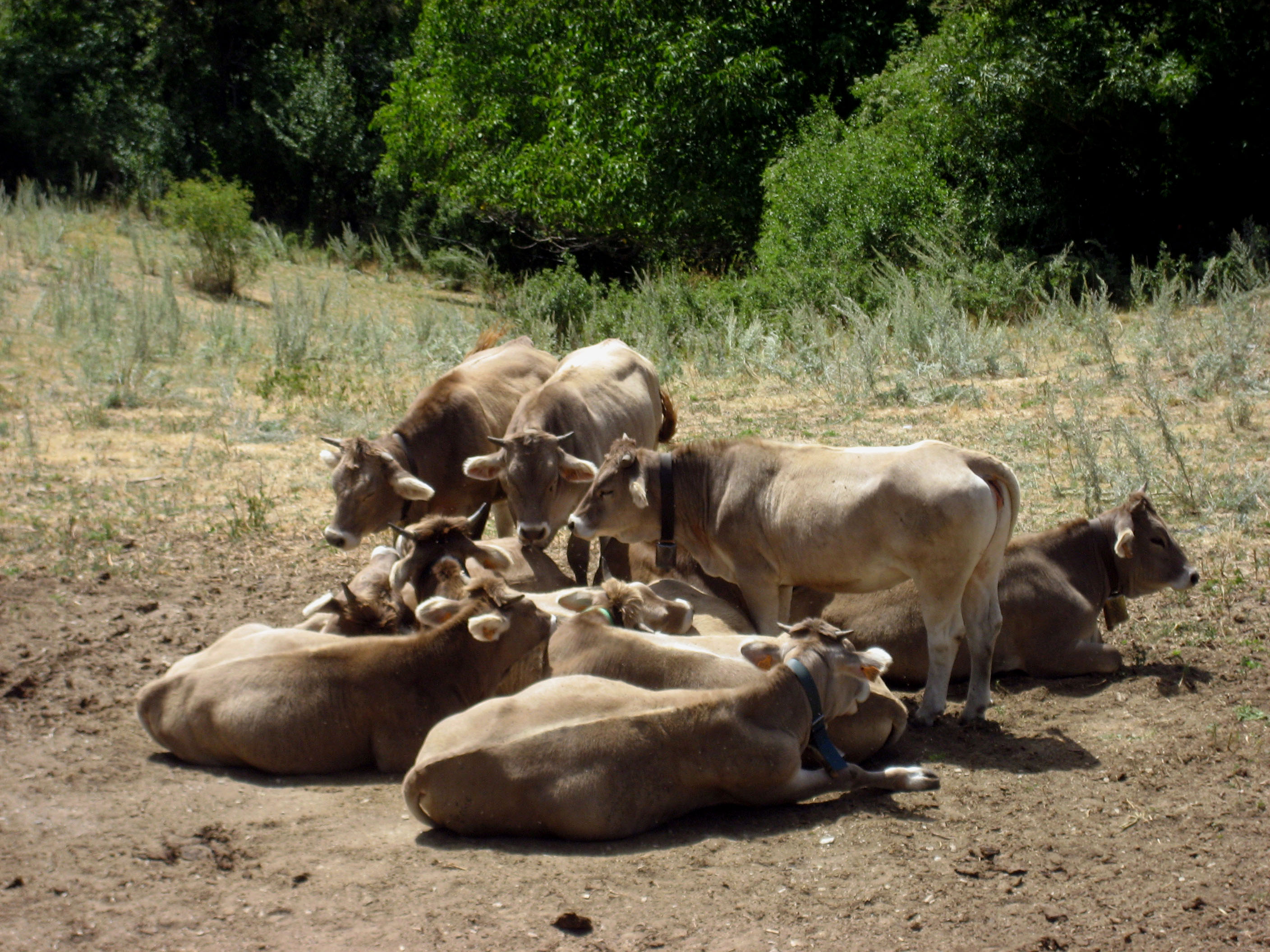 Conjunto de vacas brunas del Pirineo, en el municipio de Bescaran. Baixa Cerdanya. Cataluña